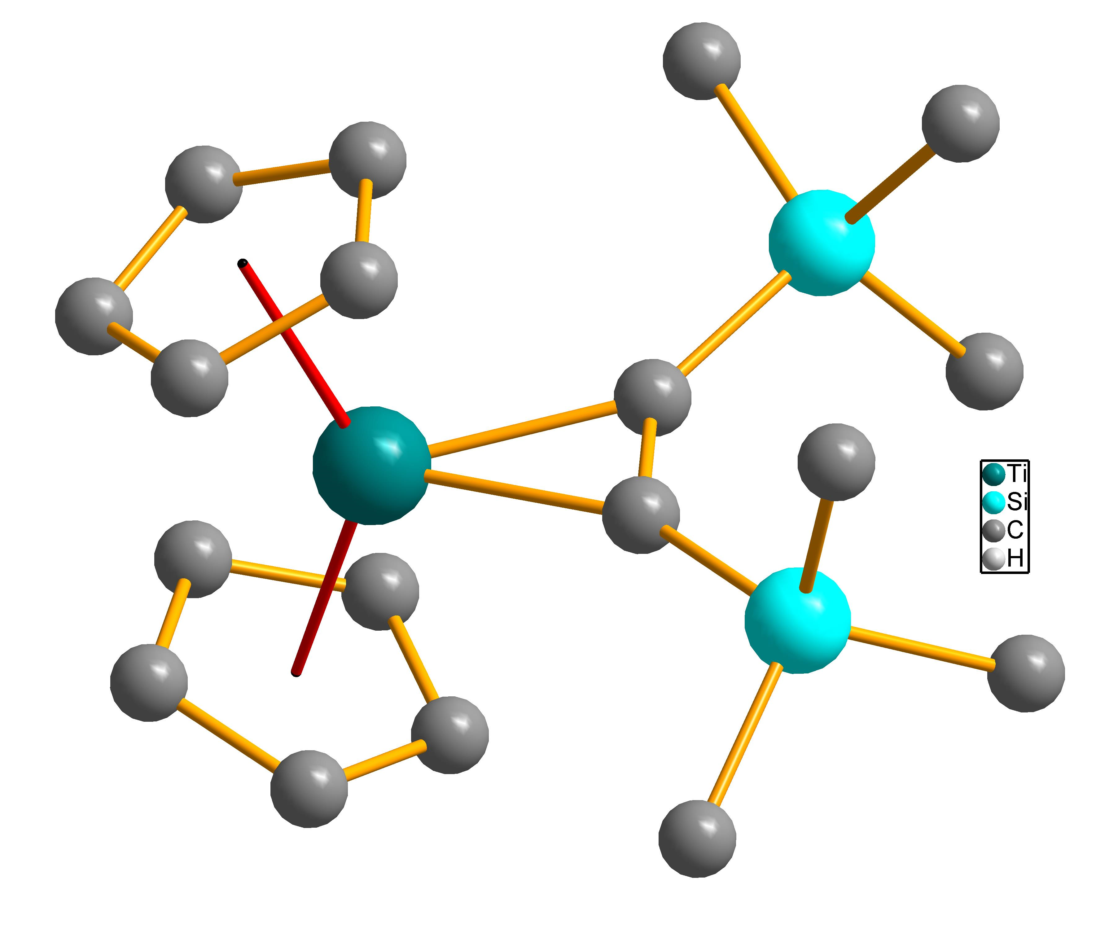 Structure of Titanocene bis(trimethylsilyl)acetylene (Rosenthal's Reagent)